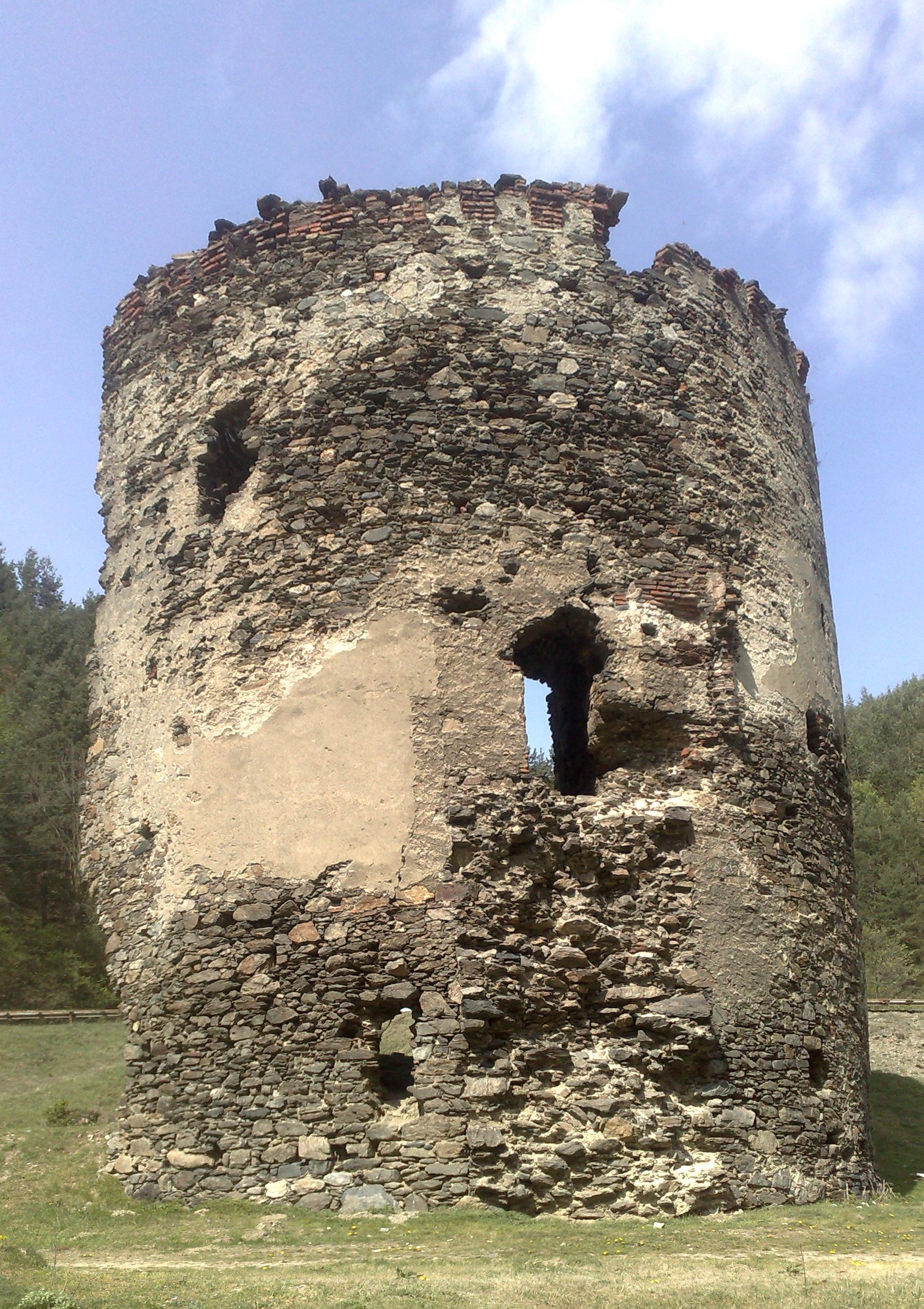 Fortificaţie medievală de la Boiţa, numită Turnu spart.